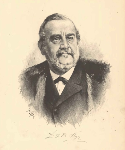 Portréty českých osobností od Jana Vilímka